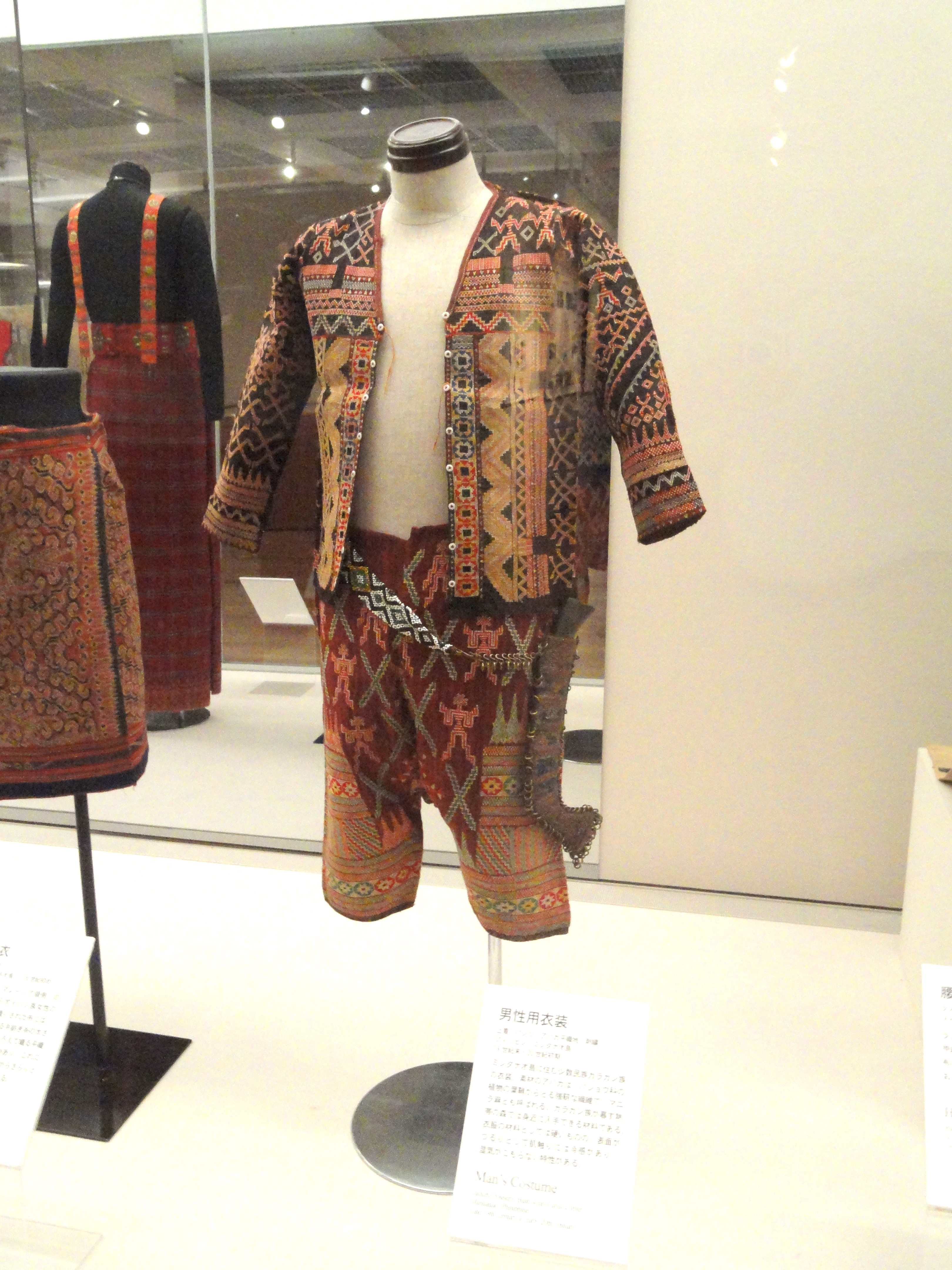 Exhibit in Bunka Gakuen Costume Museum, 3-22-7 Yoyogi, Shibuya-ku, Tokyo, Japan.